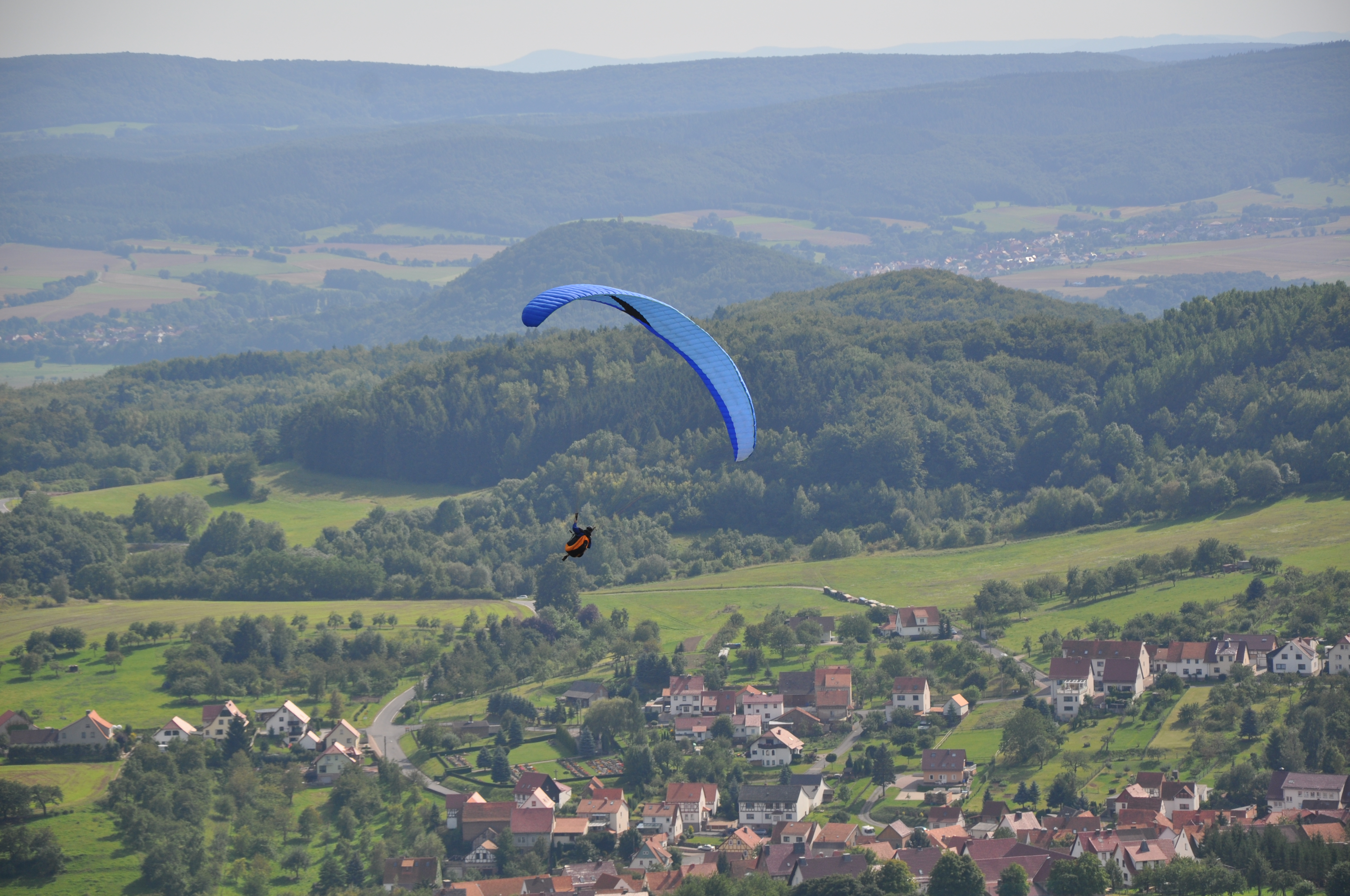 Paragleiter/Gleitschirmflieger über Kella (Eichsfeld) vom Hang der Gobert (am sogenannten Grenzeck) aufgenommen. Im Mittelteil sieht man einen Teil des Gemeindegebietes Meinhard (mit der Hasselkuppe), dann den Leuchtberg bei Eschwege und im Hintergrund den Schlierbachswald und den Ringgau (am Horizont vermutlich Teile der Rhön mit dem Baier).